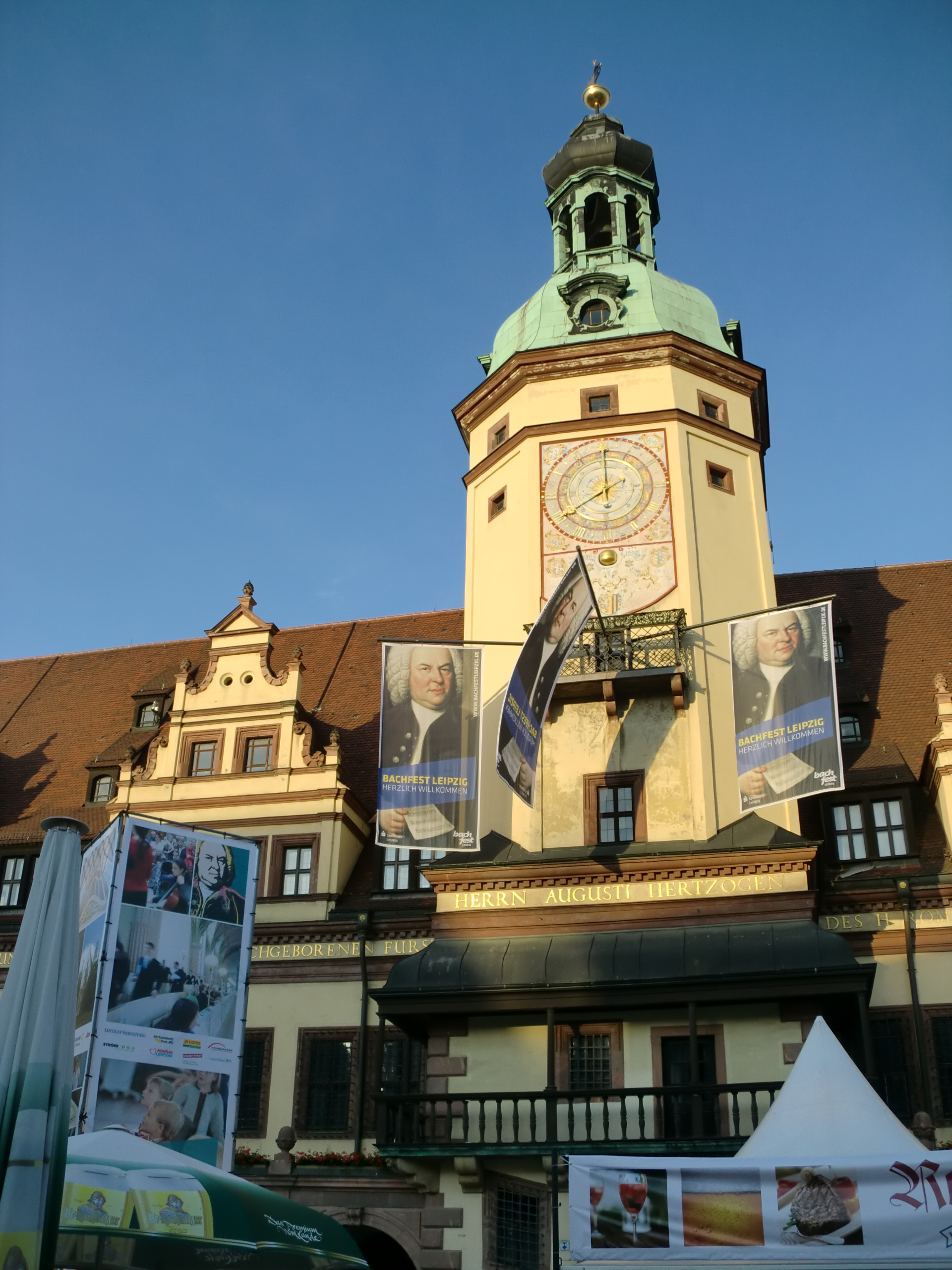 Das Alte Rathaus Leipzig zum Bachfest